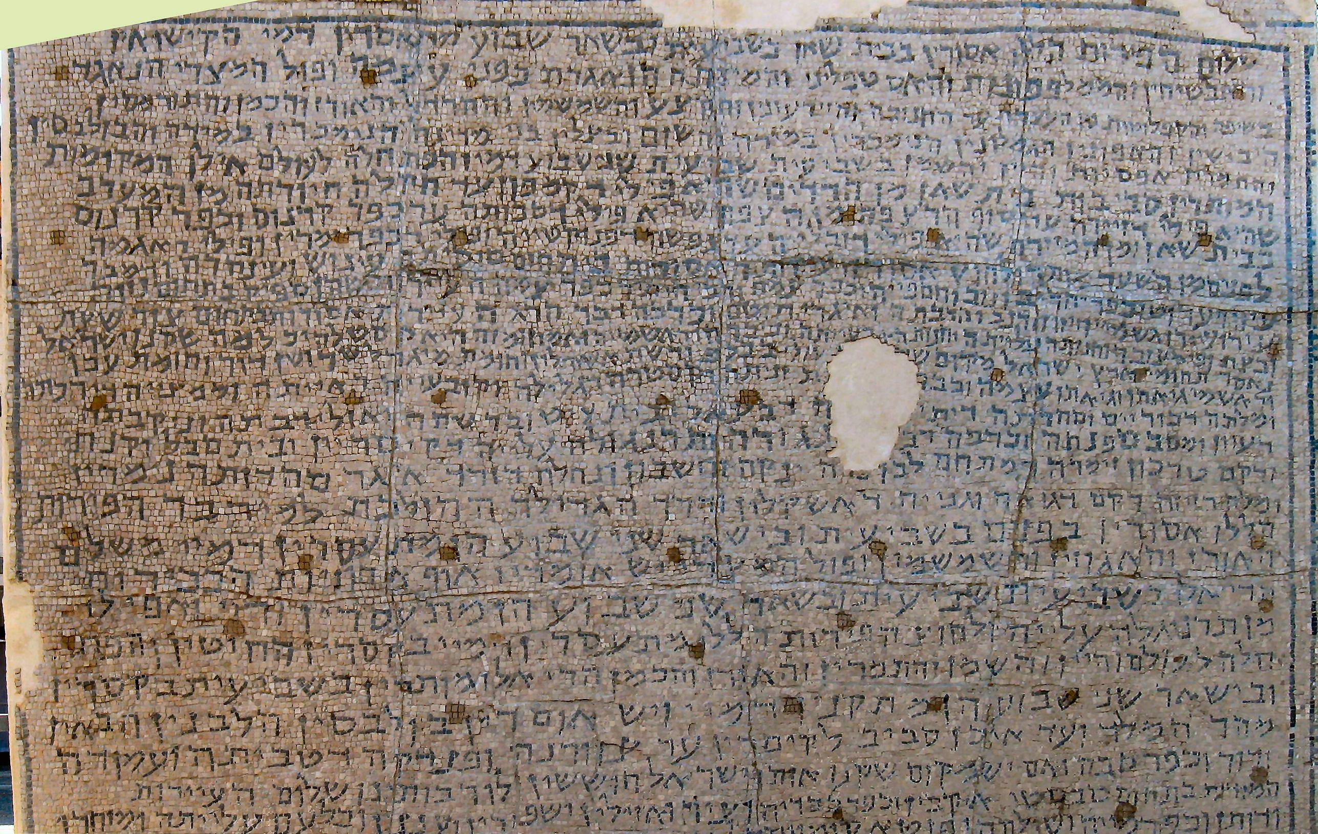 כתובת רחוב - מצויה בגן הציבורי במוזיאון ישראל רישיון נוצר על ידי משתמש:Daniel Ventura